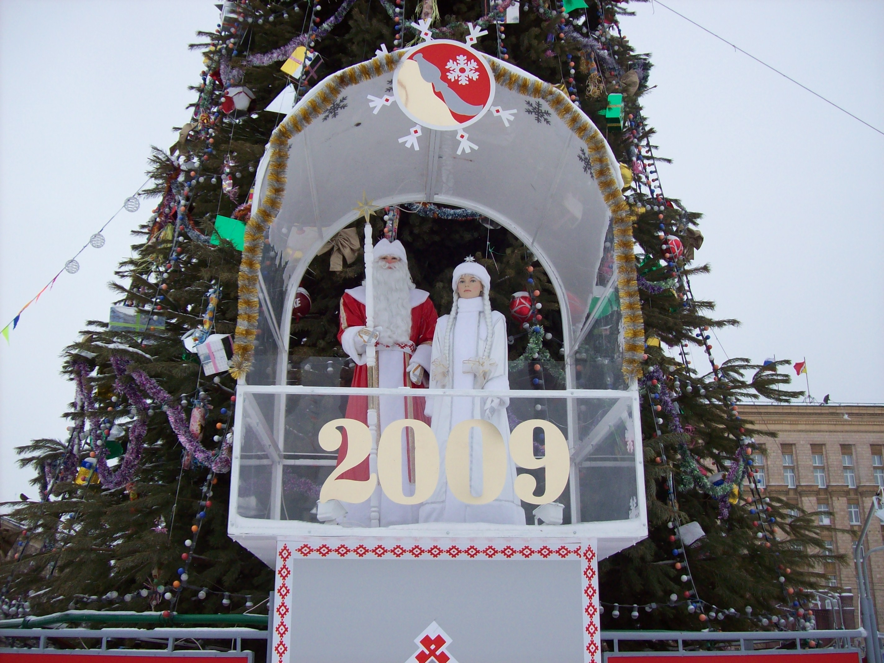 Воронеж.Дед Мороз со Снегурочкой у ёлки на пл.Ленина